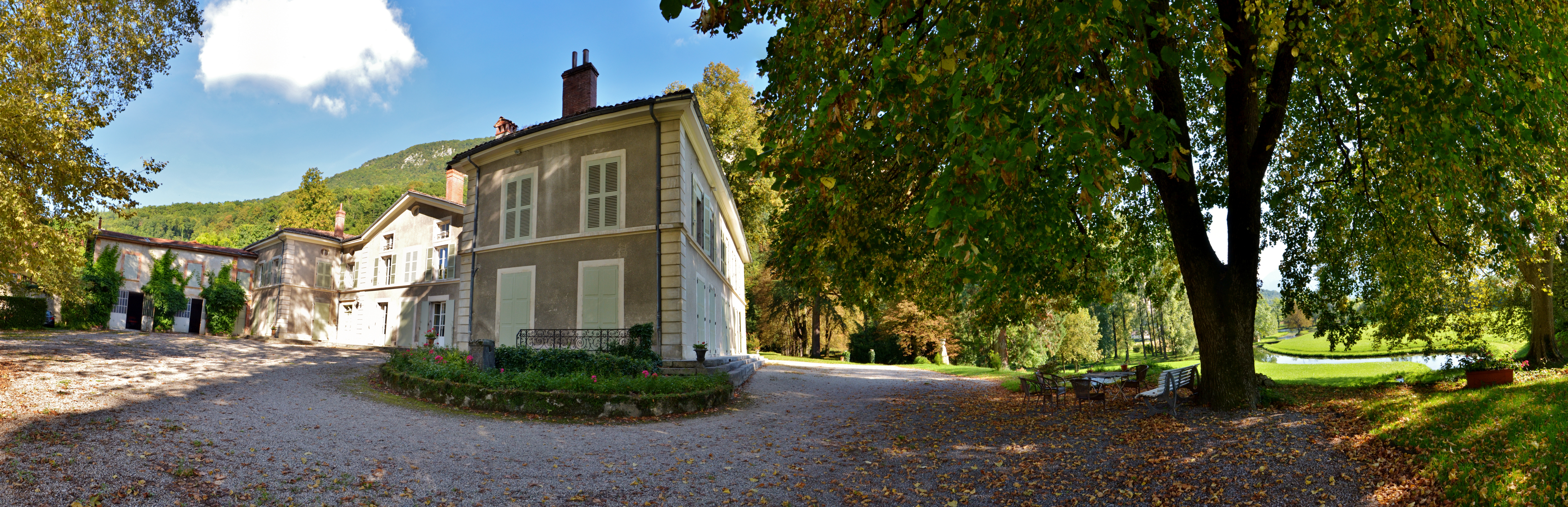 Établissement gallo-romain de La Buisse (Classé) .